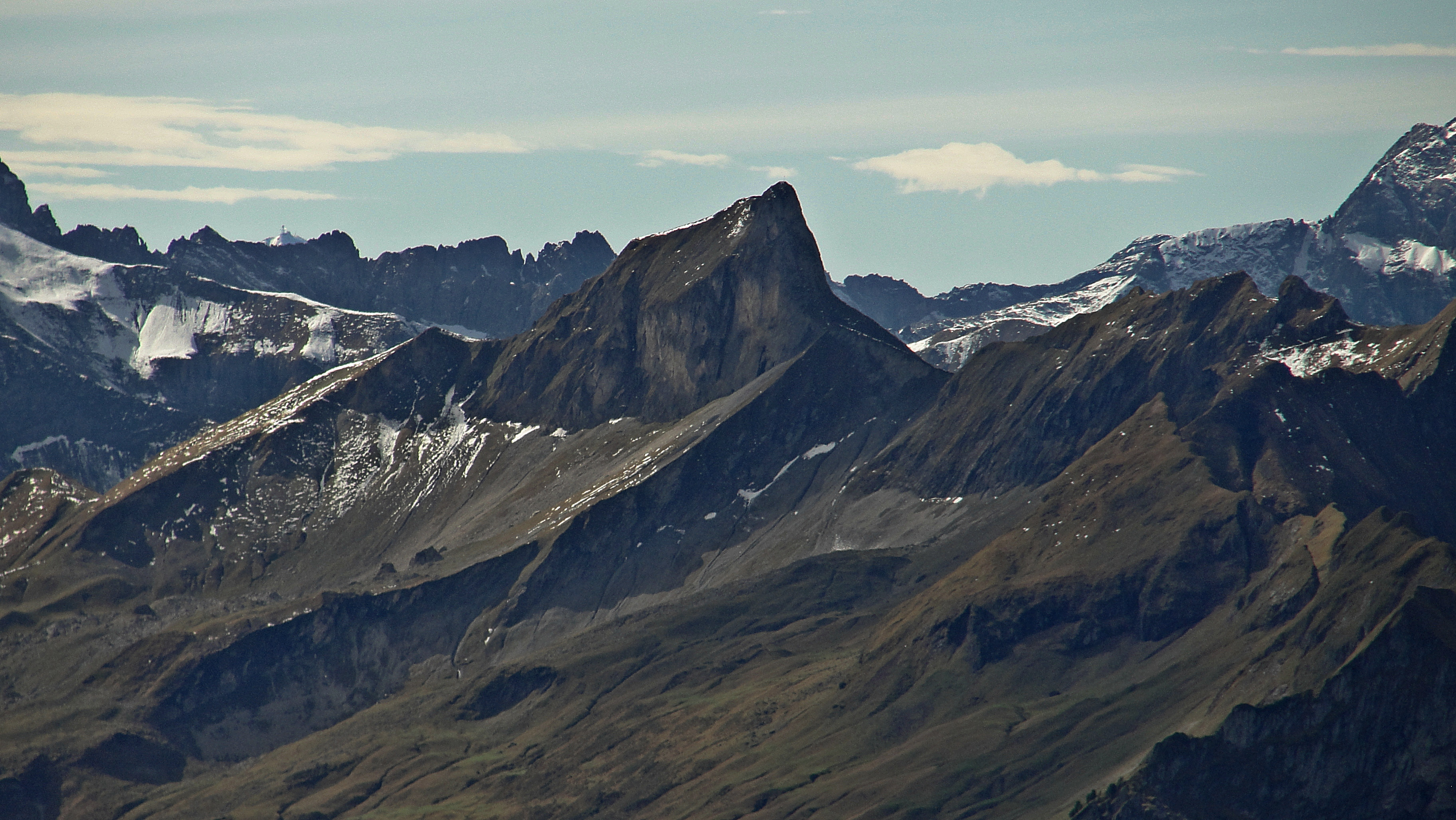 Blick von der Rohnenspitze (1990 m) nach Süden zum Schneck (2268 m), dahinter der Krottenspitzgrat.